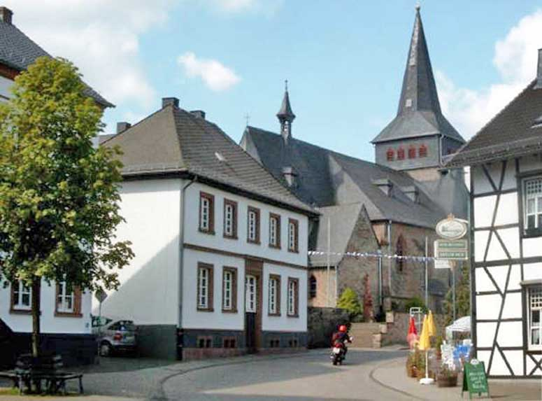 Marmagen: Kirche und Pfarrhaus an der ehemaligen Kirchgasse heute Kölner Straße